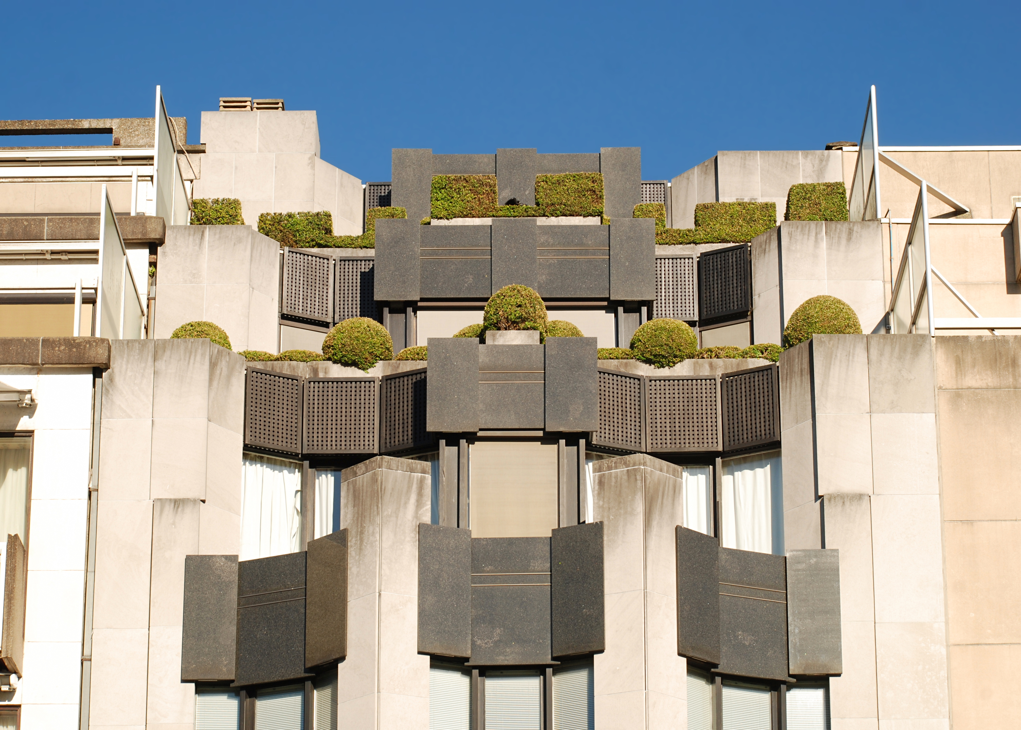 Belgique - Bruxelles - Rue de Belle-Vue 24 (Atelier de Genval - postmodernisme - 1978)